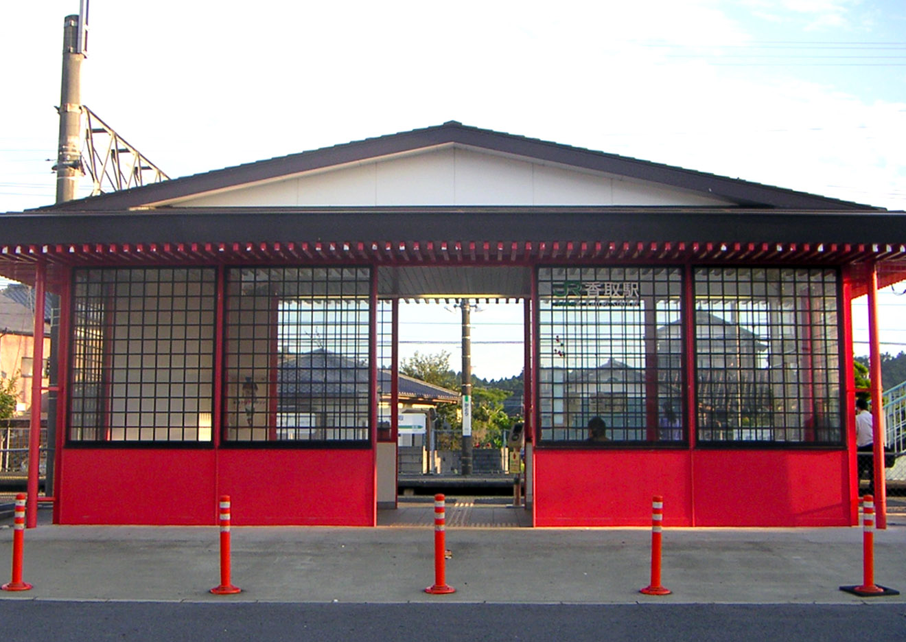 千葉県香取駅。